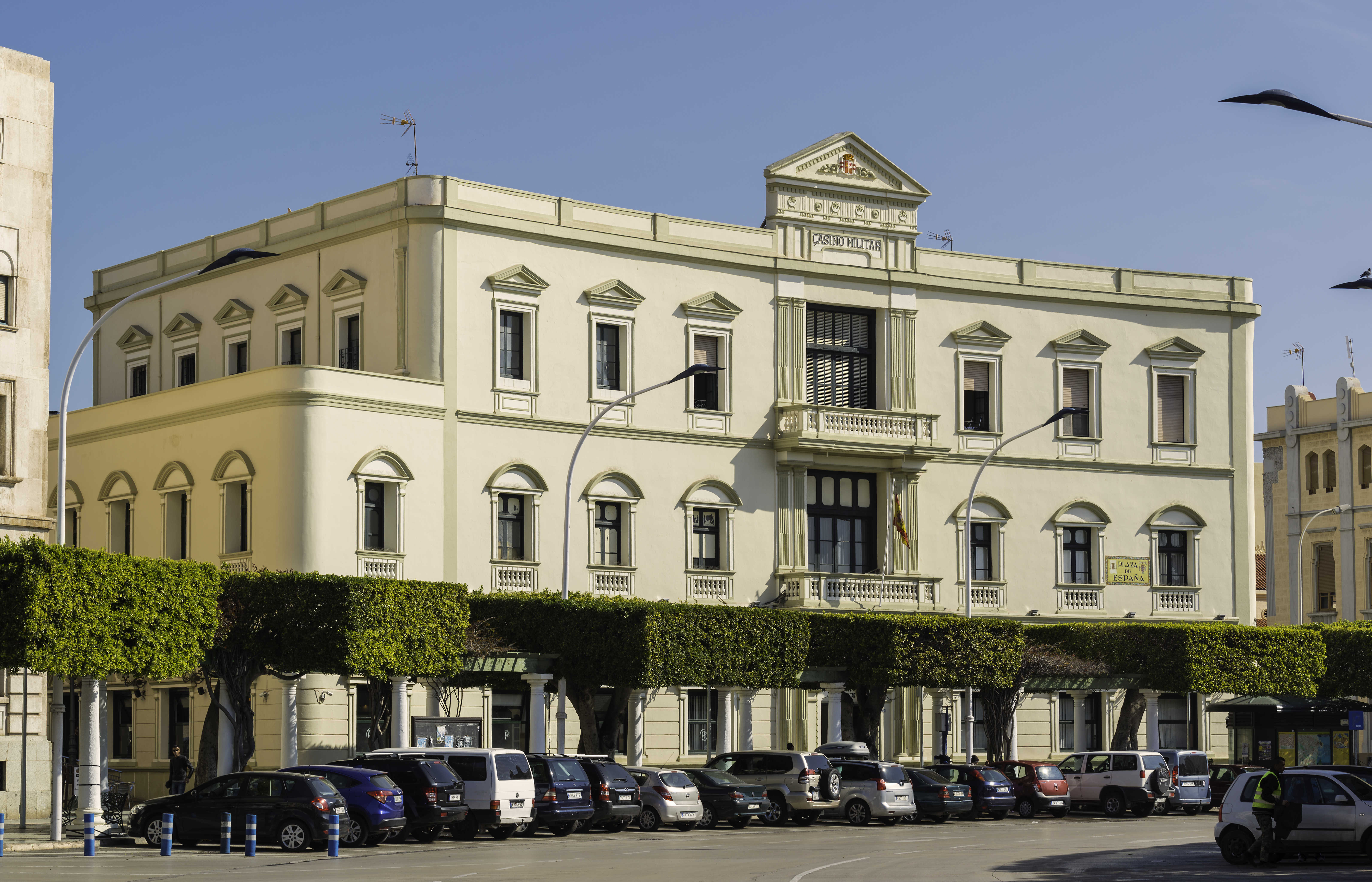 El Casino Militar es un edificio de la ciudad española de Melilla. Está situado en el Ensanche Modernista, en la plaza de España, entre el Banco de España y el Palacio de la Asamblea. Forma parte del Conjunto Histórico Artístico de la Ciudad de Melilla, un Bien de Interés Cultural.